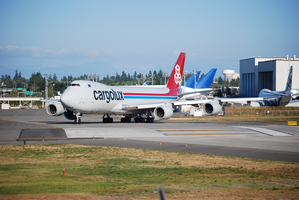 Cargolux's 747-8F